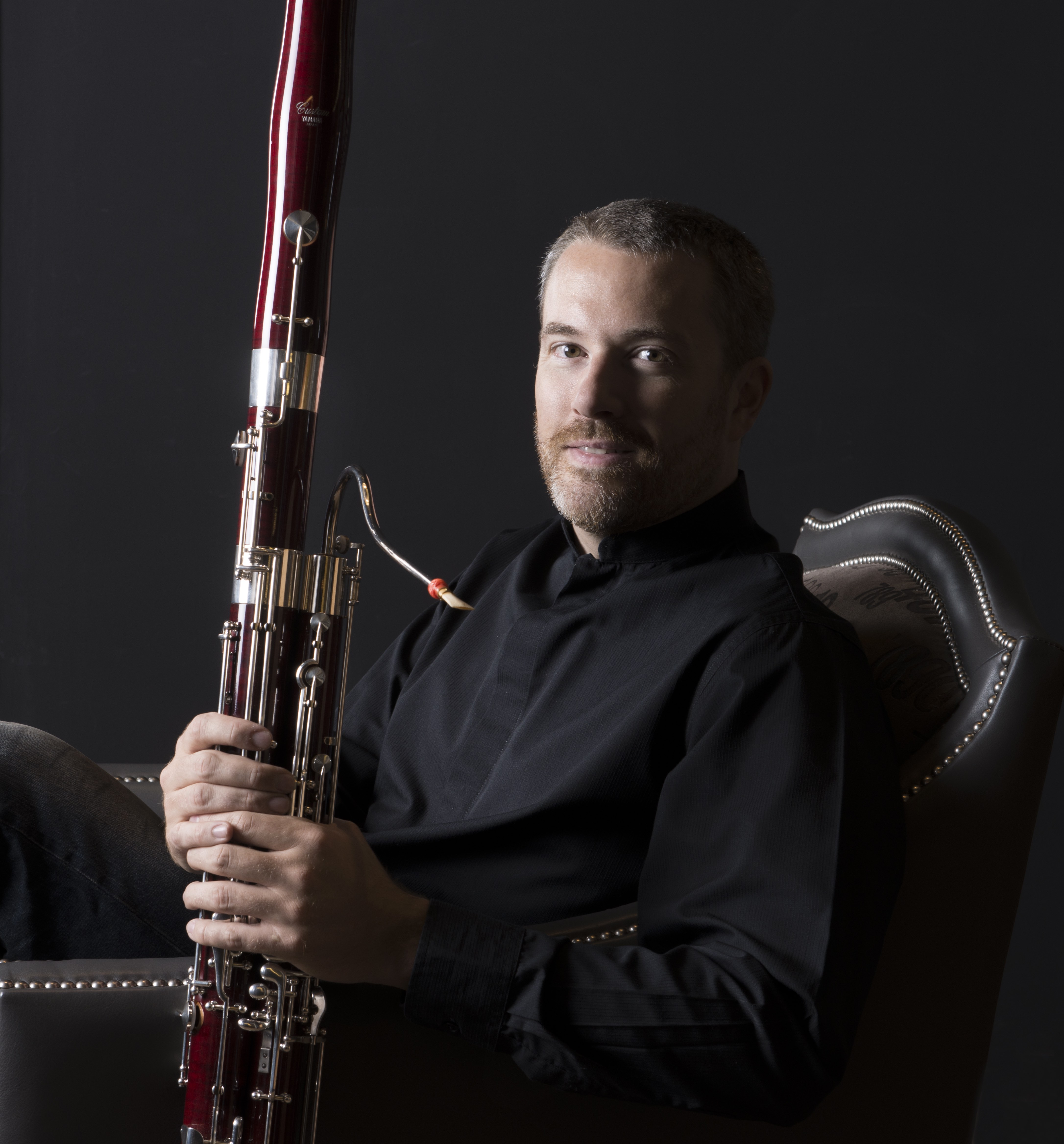 Portrait David Seidel